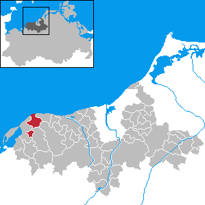 Bastorf in Mecklenburg-Western Pomerania - District Bad Doberan